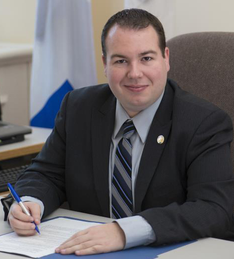 Photo de Dave Turcotte député de l'Assemblée nationale du Québec